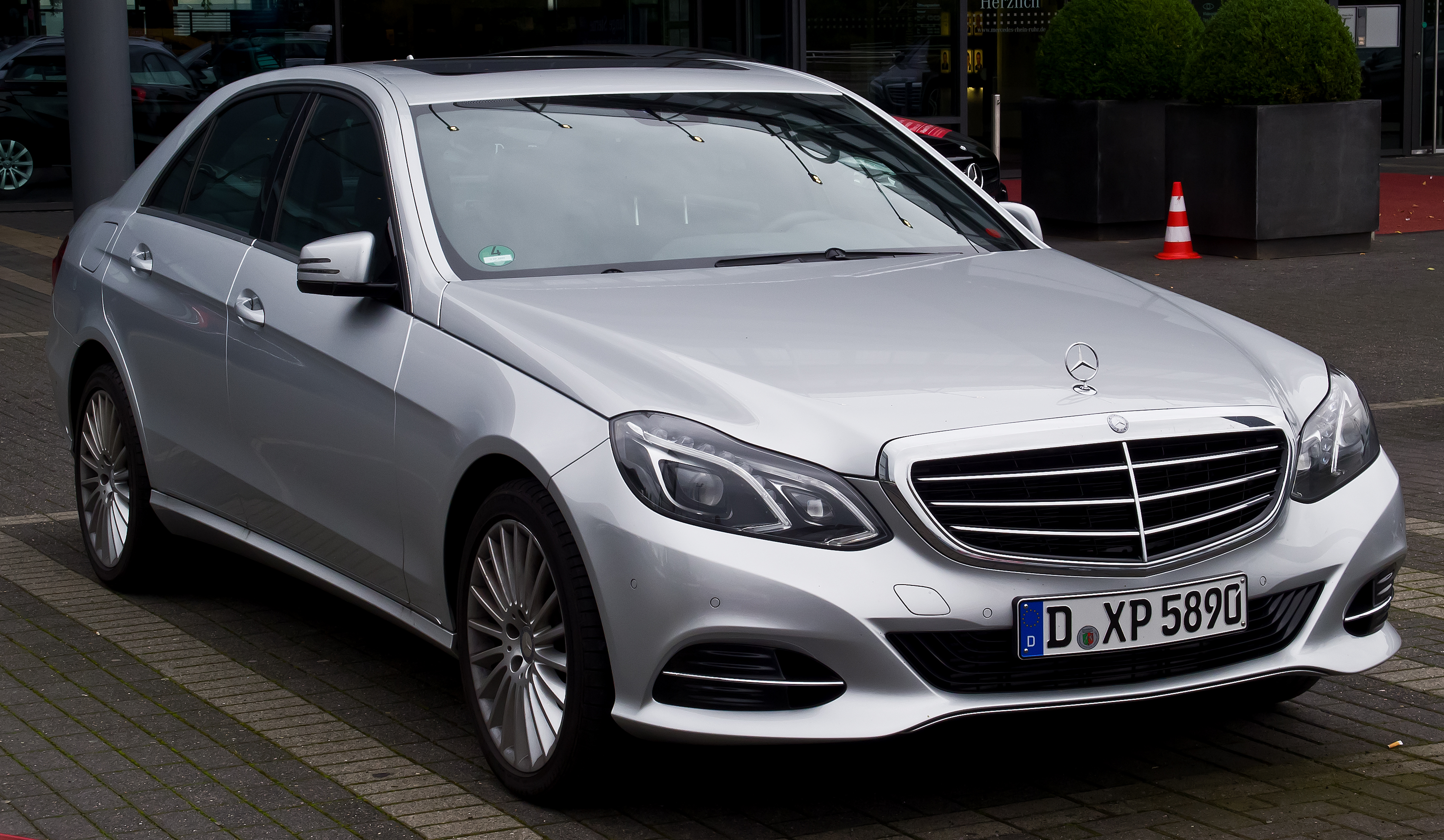 Mercedes-Benz E 220 CDI Elegance (W 212, Facelift)